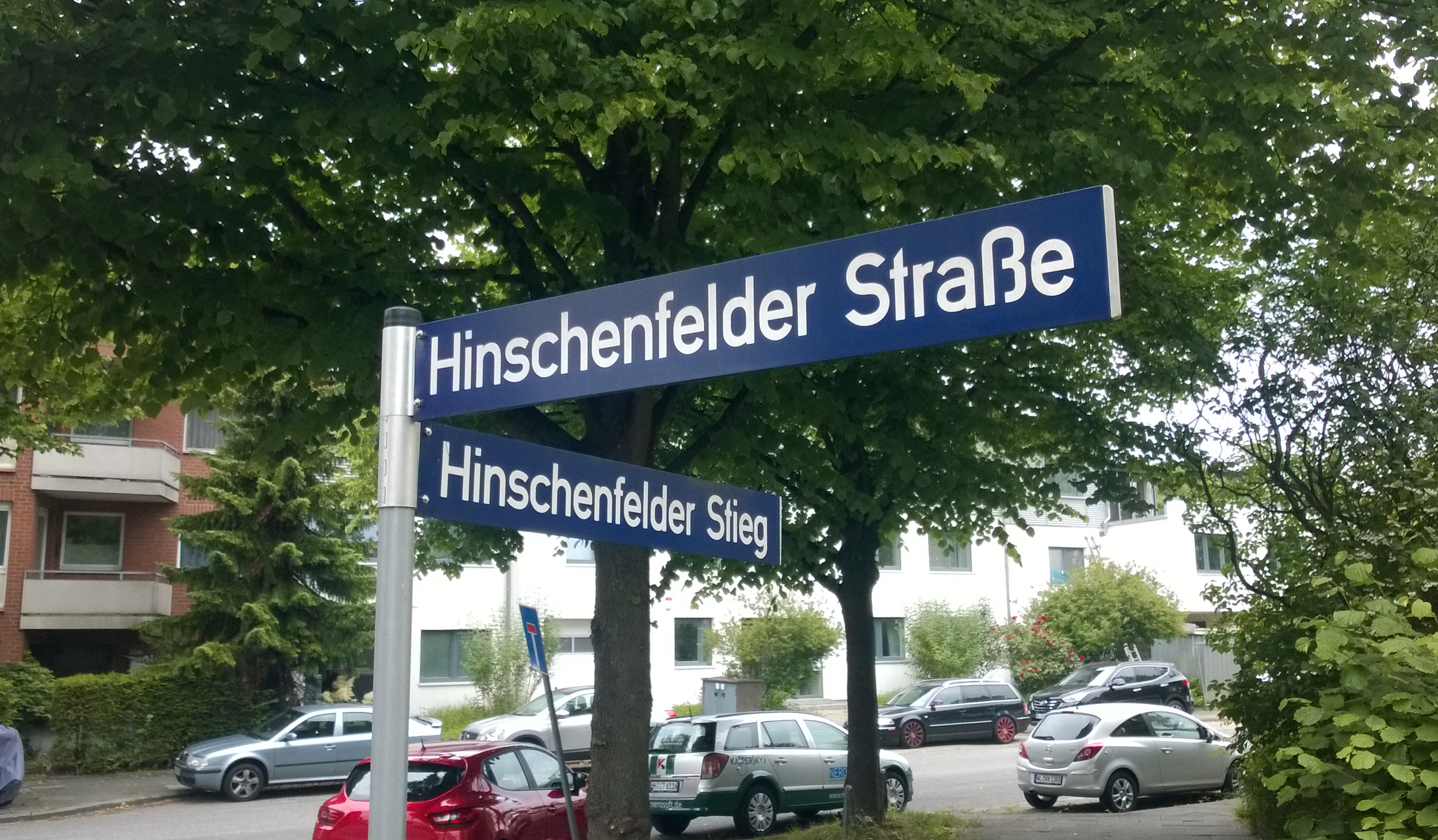 Hinschenfelder Straße und Hinschenfelder Stieg in Hamburg Hinschenfelde (heute Hamburg-Wandsbek)